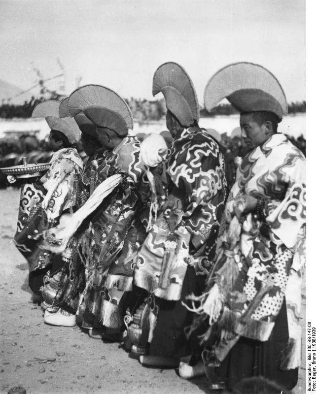 Lhasa, Festhandlungen: Tänze, Paraden, Zuschauer anlässlich des letzten Tages des Neujahrsfestes (Orakel)